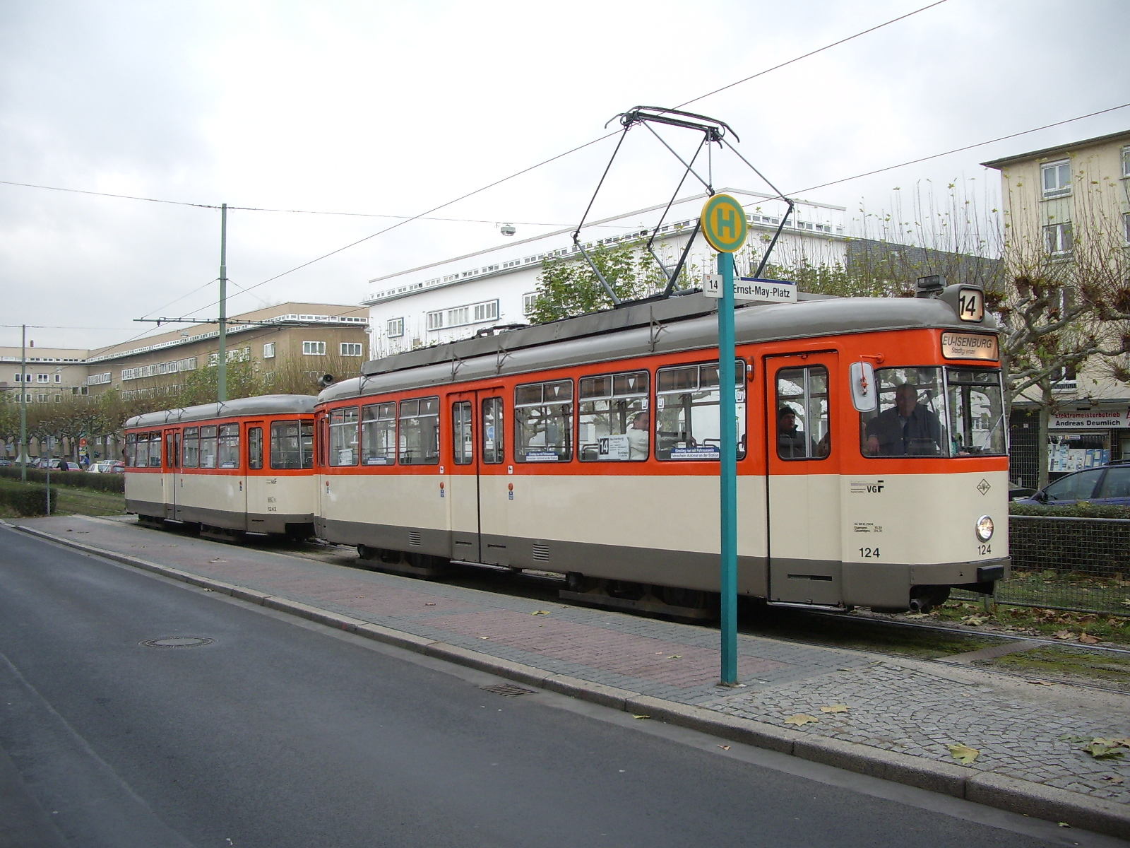 VGF tram L 124 at Ernst May Square, Frankfurt am Main, December 3rd 2005. Photo by myself, GNU-FDL. VGF-Straßenbahnwagen L 124 am Ernst-May-Platz, Frankfurt am Main, 3. Dezember 2005. Selbst fotografiert, GNU-FDL.